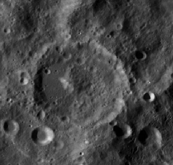 Cráter lunar Sierpinski. (Imagen LRO)